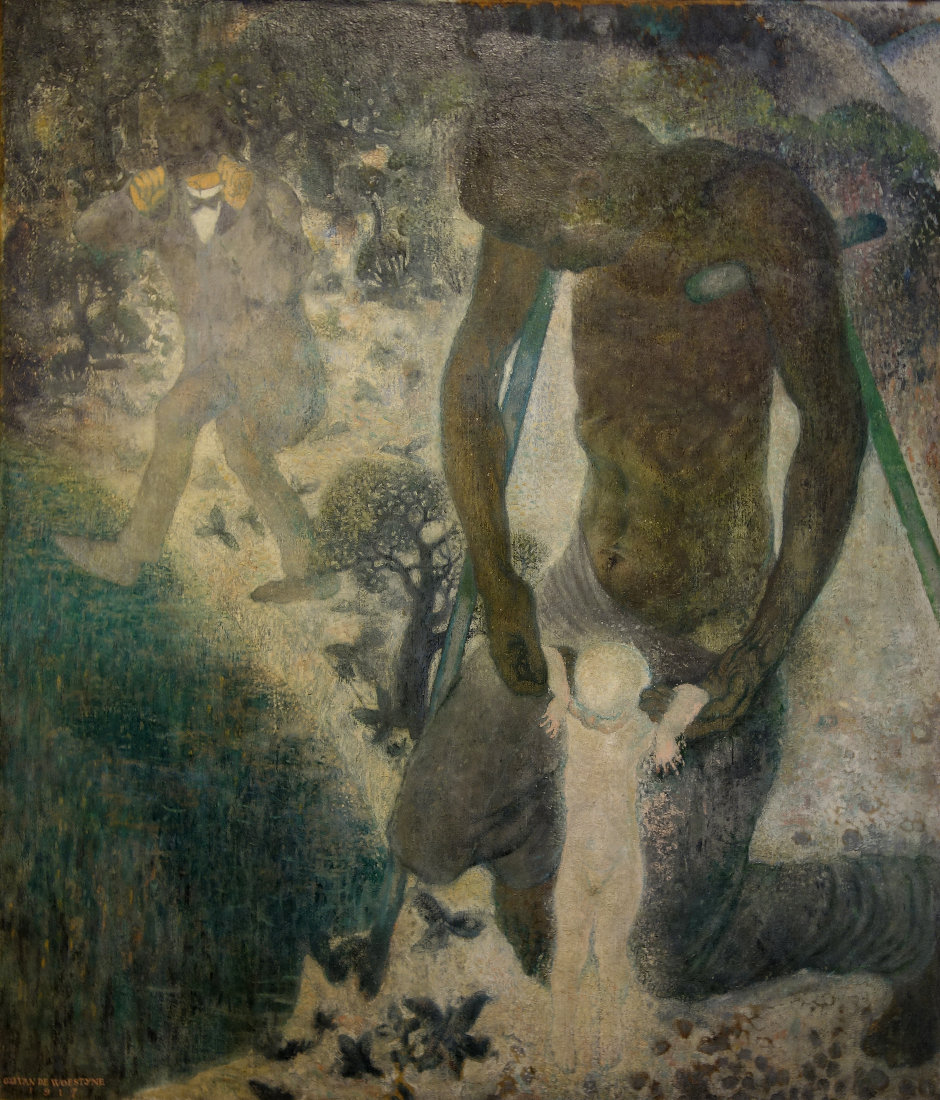 Gustave Van de Woesteyne, De moedwillige blinde en de kreupele die een kindje leren lopen, 1917-18, verzameling MUDEL, Deinze